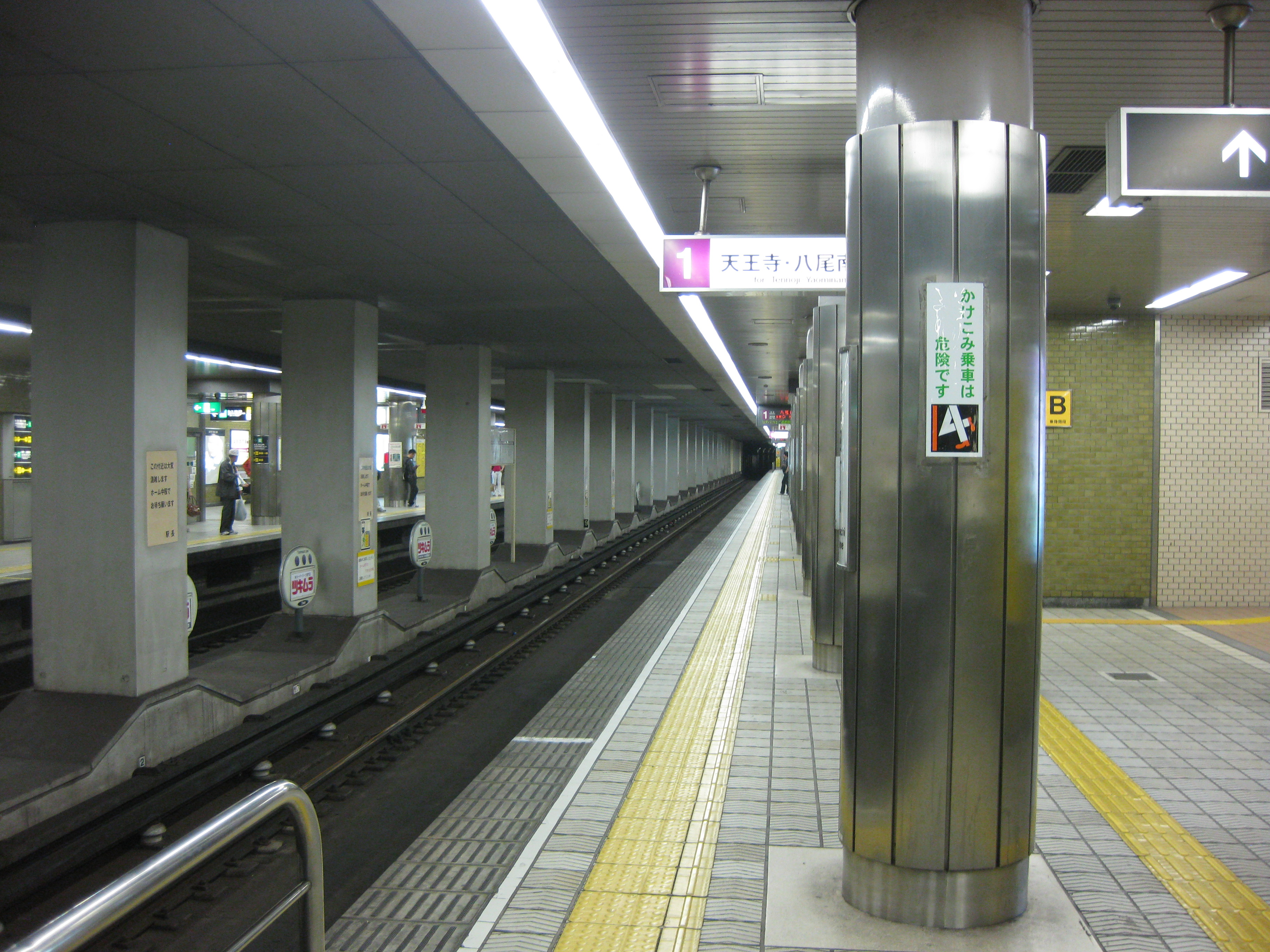 大阪市営地下鉄谷町線谷町四丁目駅プラットホーム